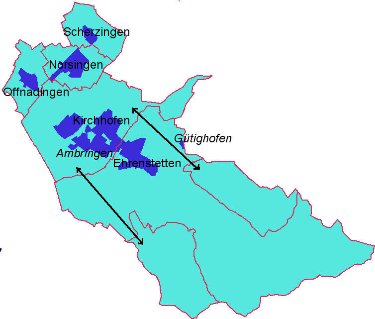 Gemarkung der Gemeinde Ehrenkirchen, Deutschland